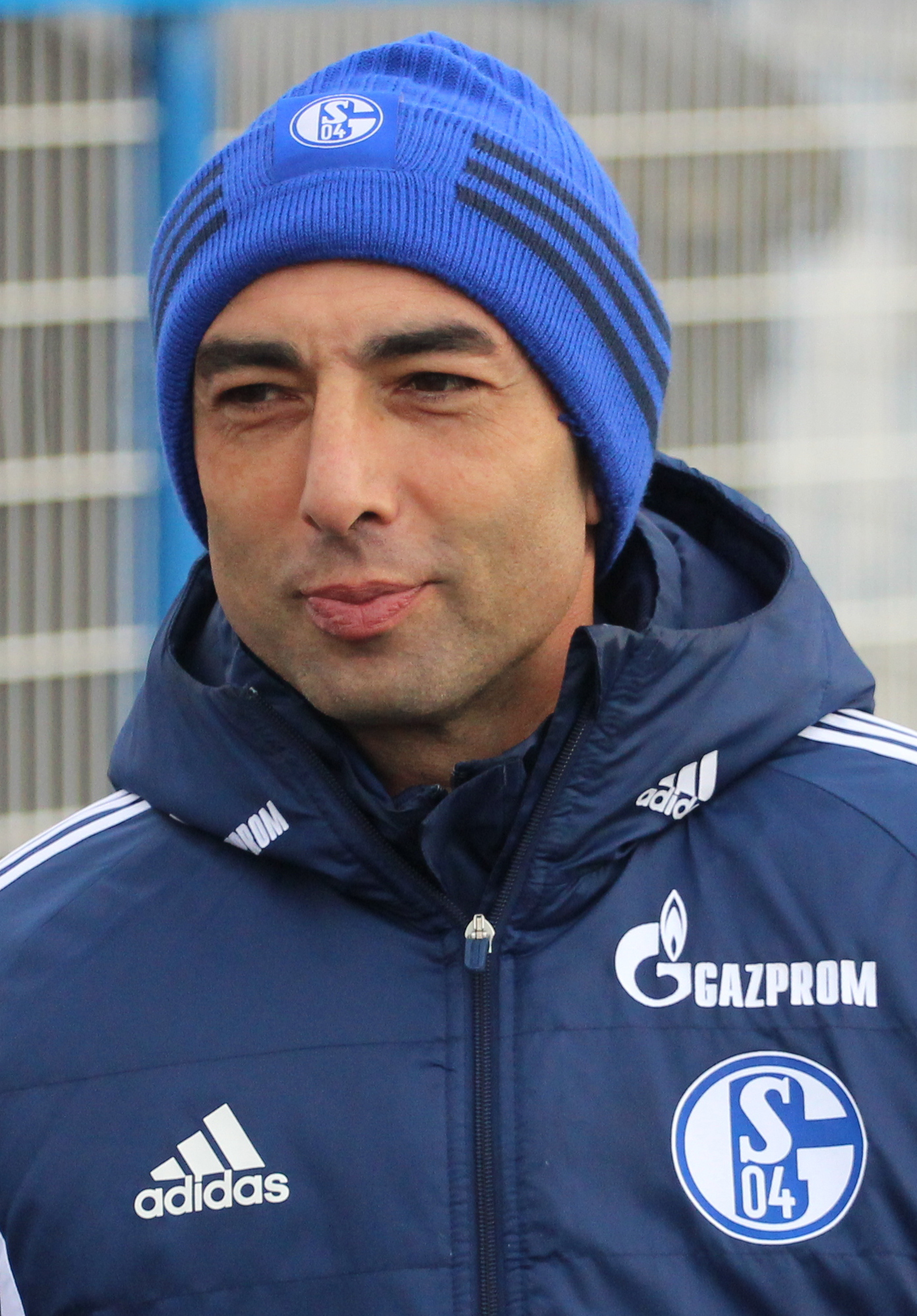 Di Matteo, 2015 yılında Schalke 04 ile antrenmanda.